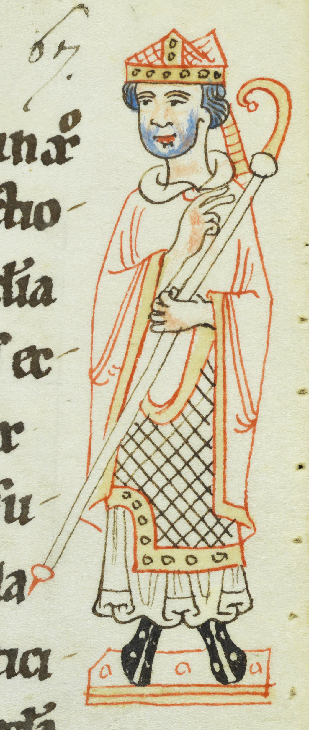 Acta Sancti Petri in Augia; St. Gallen, Kantonsbibliothek, Vadianische Sammlung, VadSlg Ms. 321, S. 67, Bischof Konrad II. von Tägerfelden